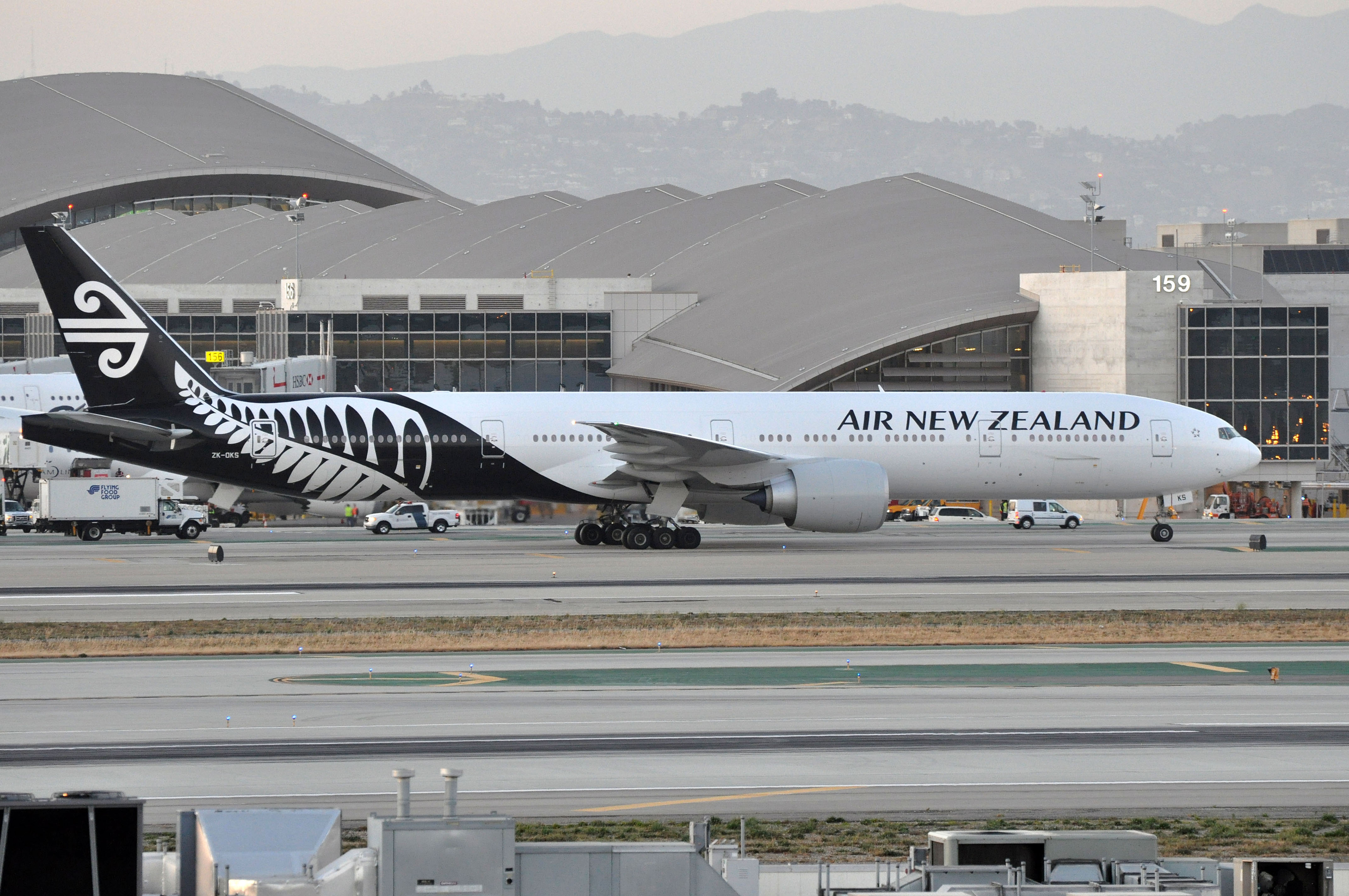 MSN 44547 LN 1237 B777-319ER / 777 / 777-300 / 777-300ER AIR NEW ZEALAND LAX AIRPORT